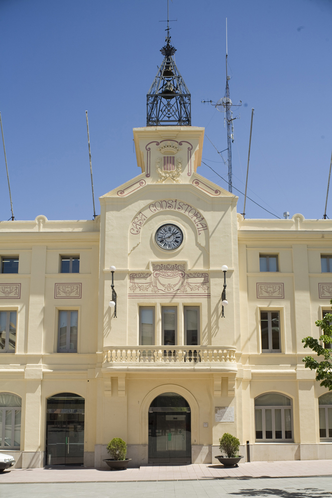 unidentified Cultural Heritage Spain